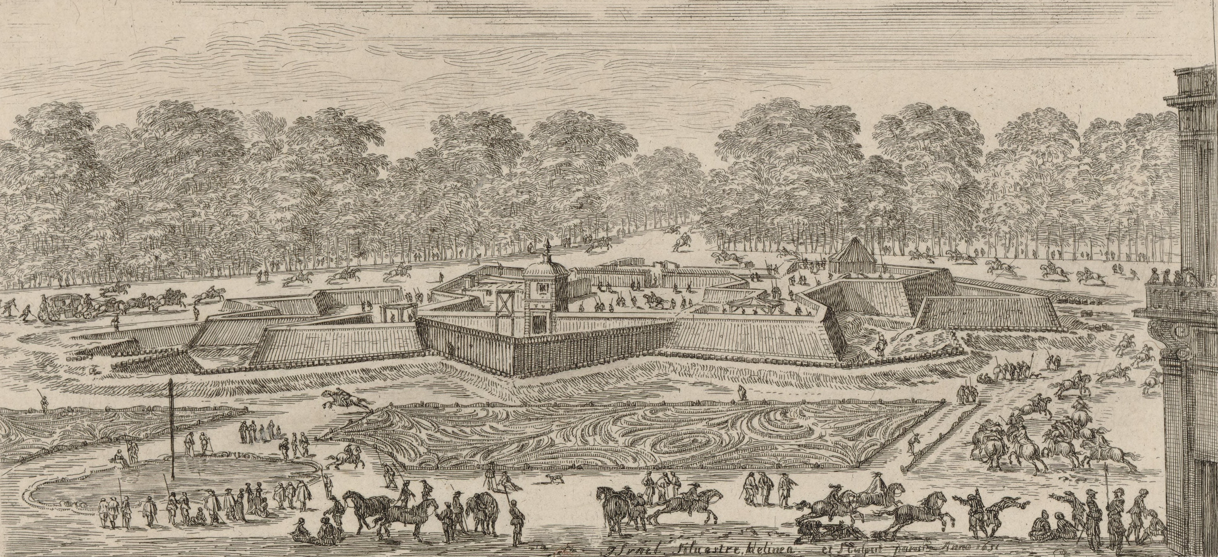 Vue du fort Royal fait en l'année 1650 dans le jardin du Palais cardinal pour le divertissement du Roi.